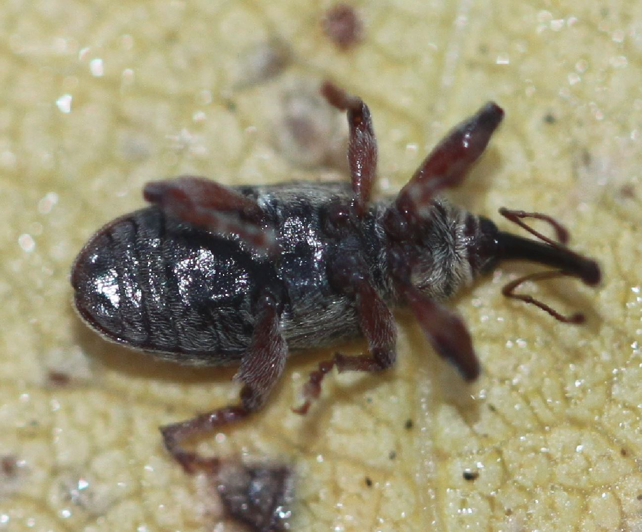 Rüsselkäfer Dorytomus filirostris, Männchen, am 16. November 2019 in der Nähe einer Pappelreihe